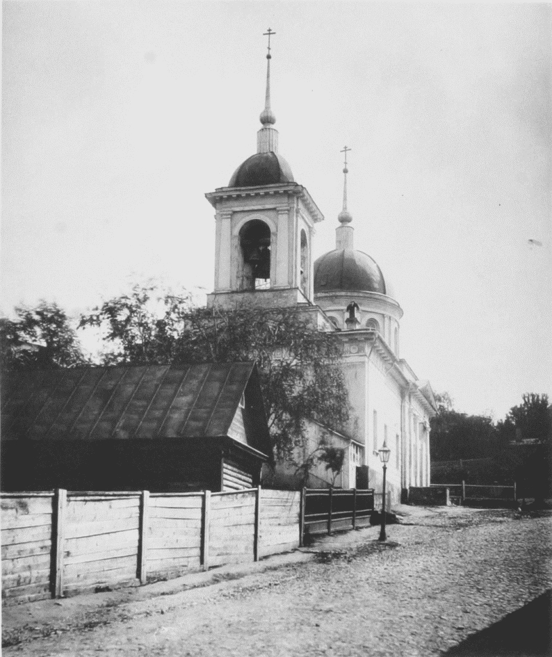 Храм Святителя Николая в Котельниках